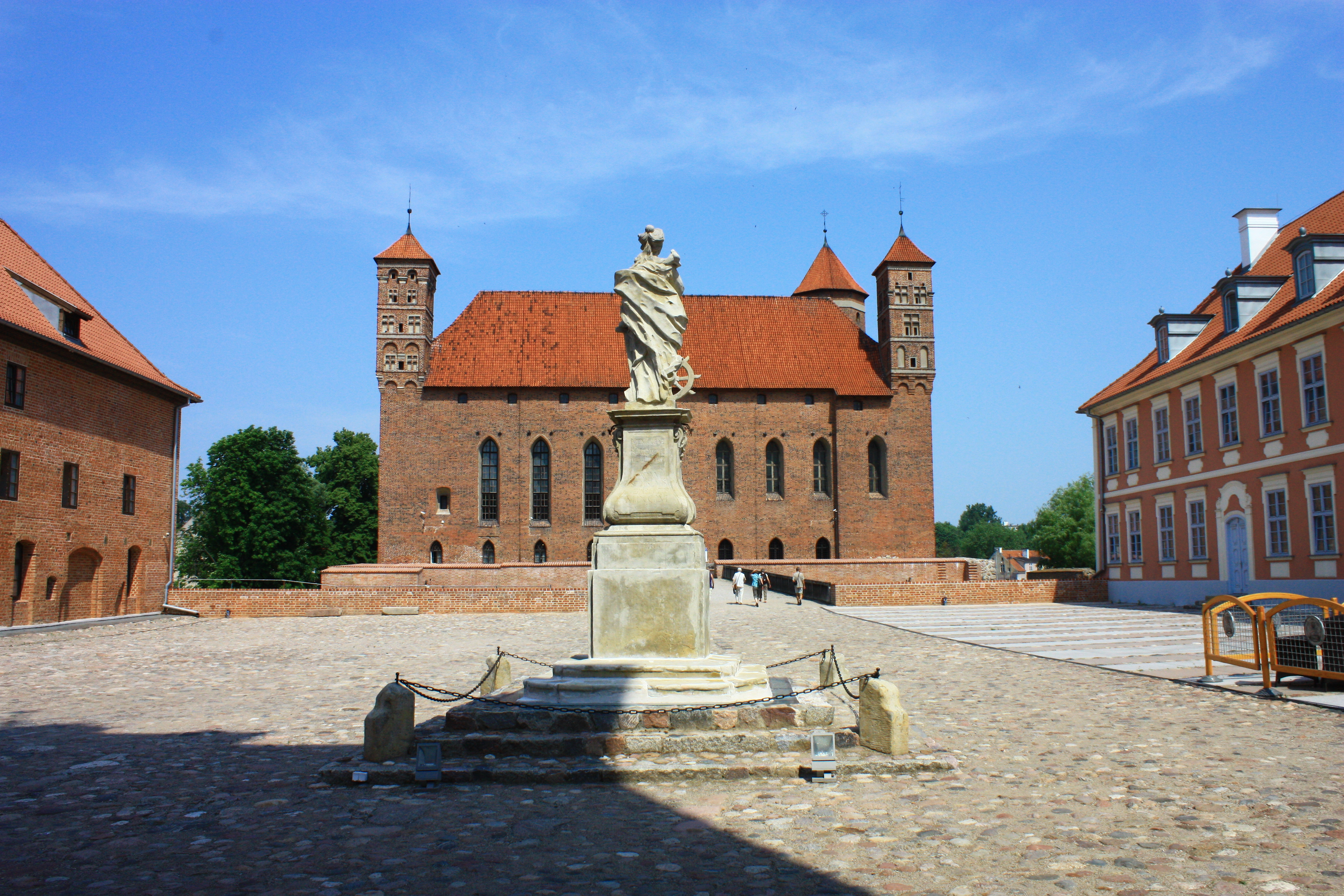 Lidzbark Warmiński, zespół zamku biskupiego, XIV, XIX